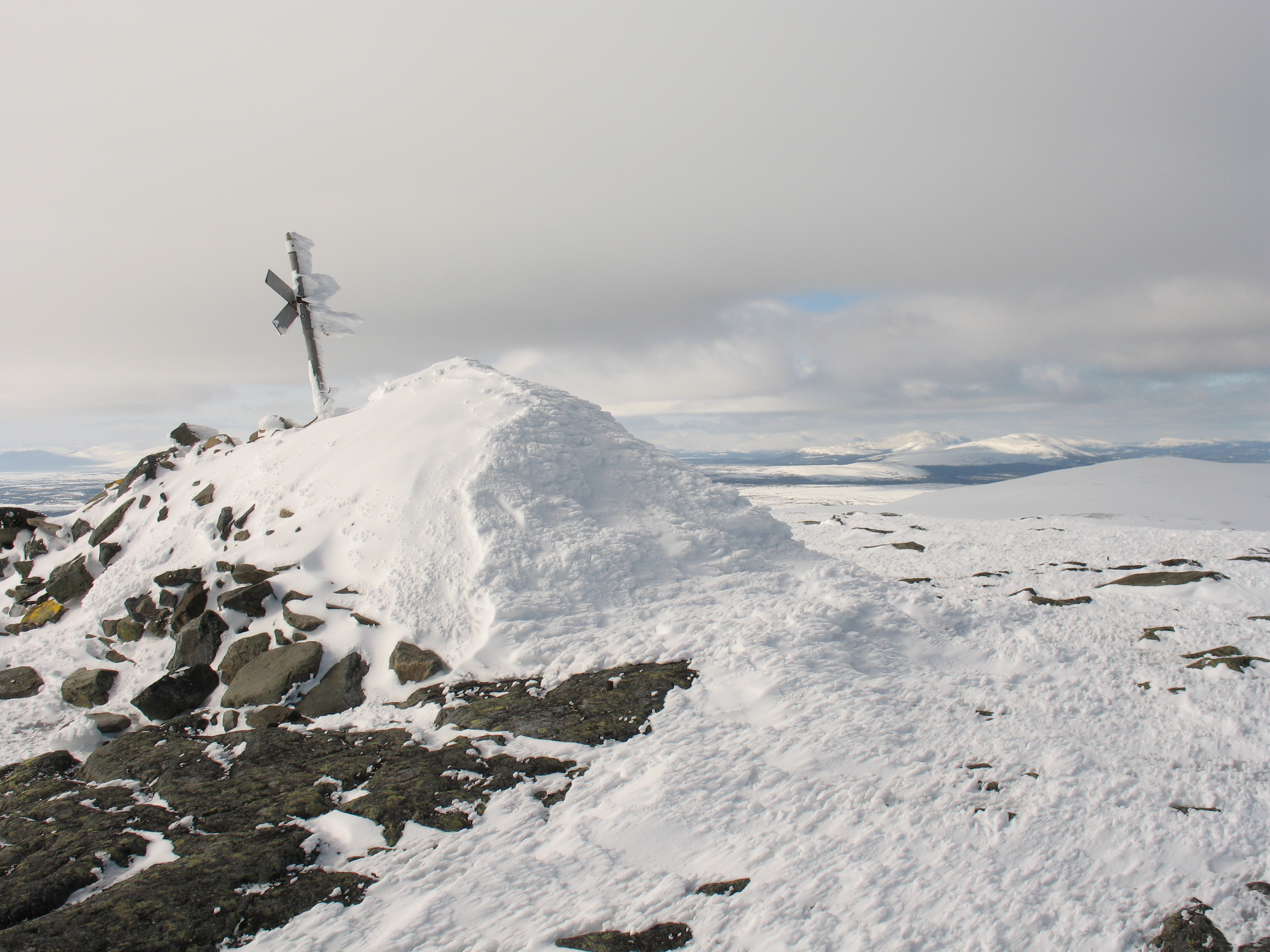 Västfjället